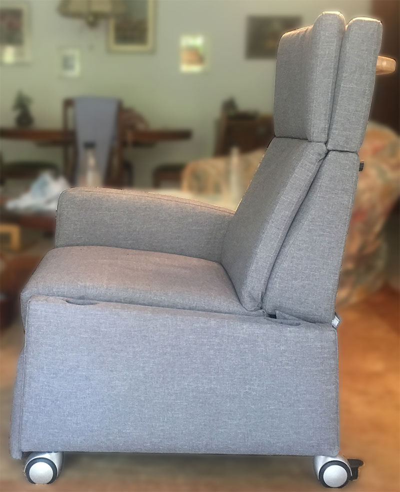 Pflegesessel mit einseitig entfernter Armlehnen. Dadurch kann der Betroffenen leichter vom Bett oder Rollstuhl auf den Sessel. Ebenso ist dadurch die Pflege / Behandlung des Betroffenen erst möglich, das der gesamte Körper erreichbar ist. Auch in der Liegelage können bei dem Pflegesessel die Armlehnen entfernt werden.